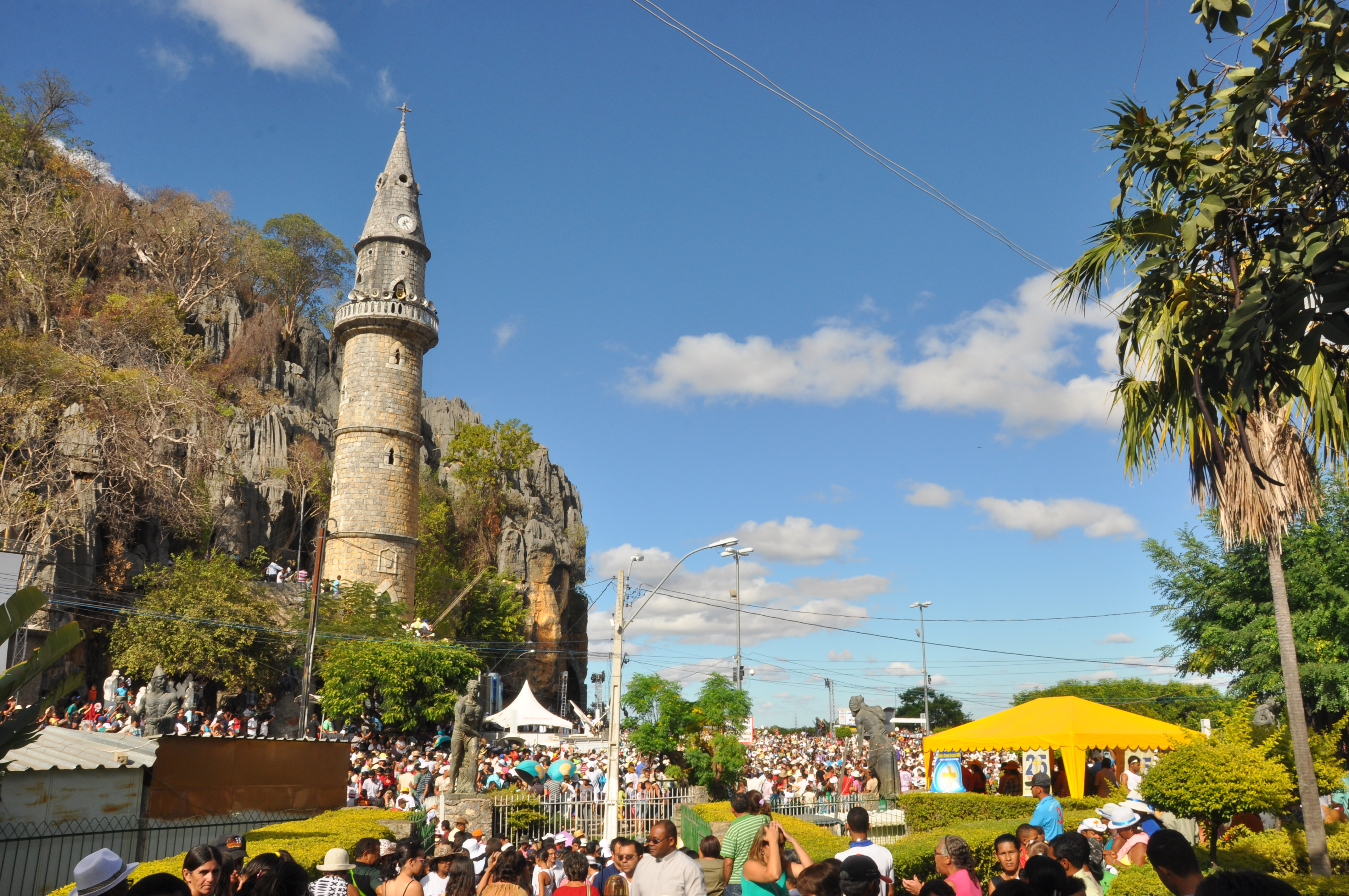 Romaria na gruta do santuário de Bom Jesus da Lapa, agosto de 2011